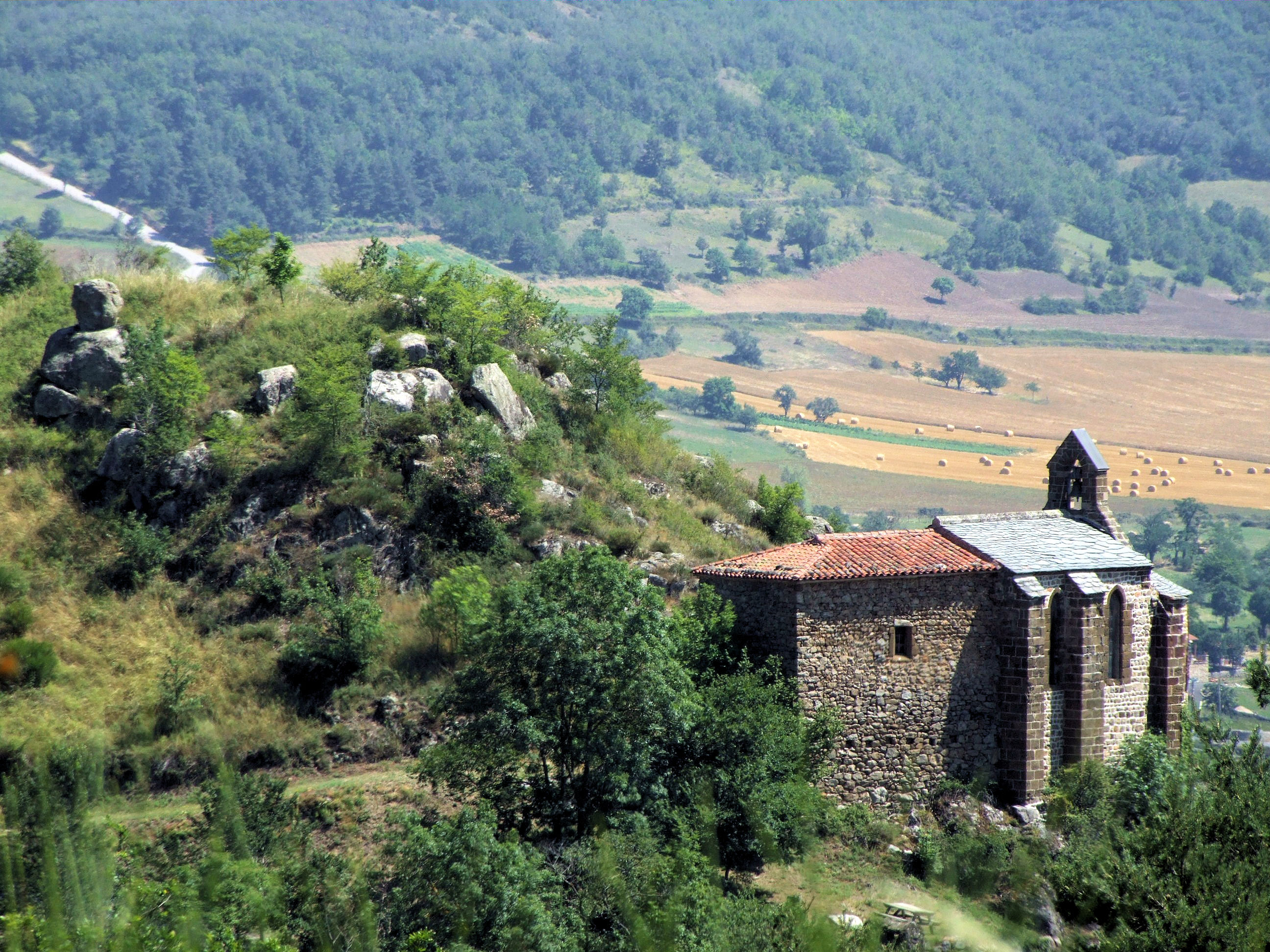 Aubazat - Chapelle de Peyrusse